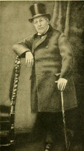 photographie du comte Charles Léon